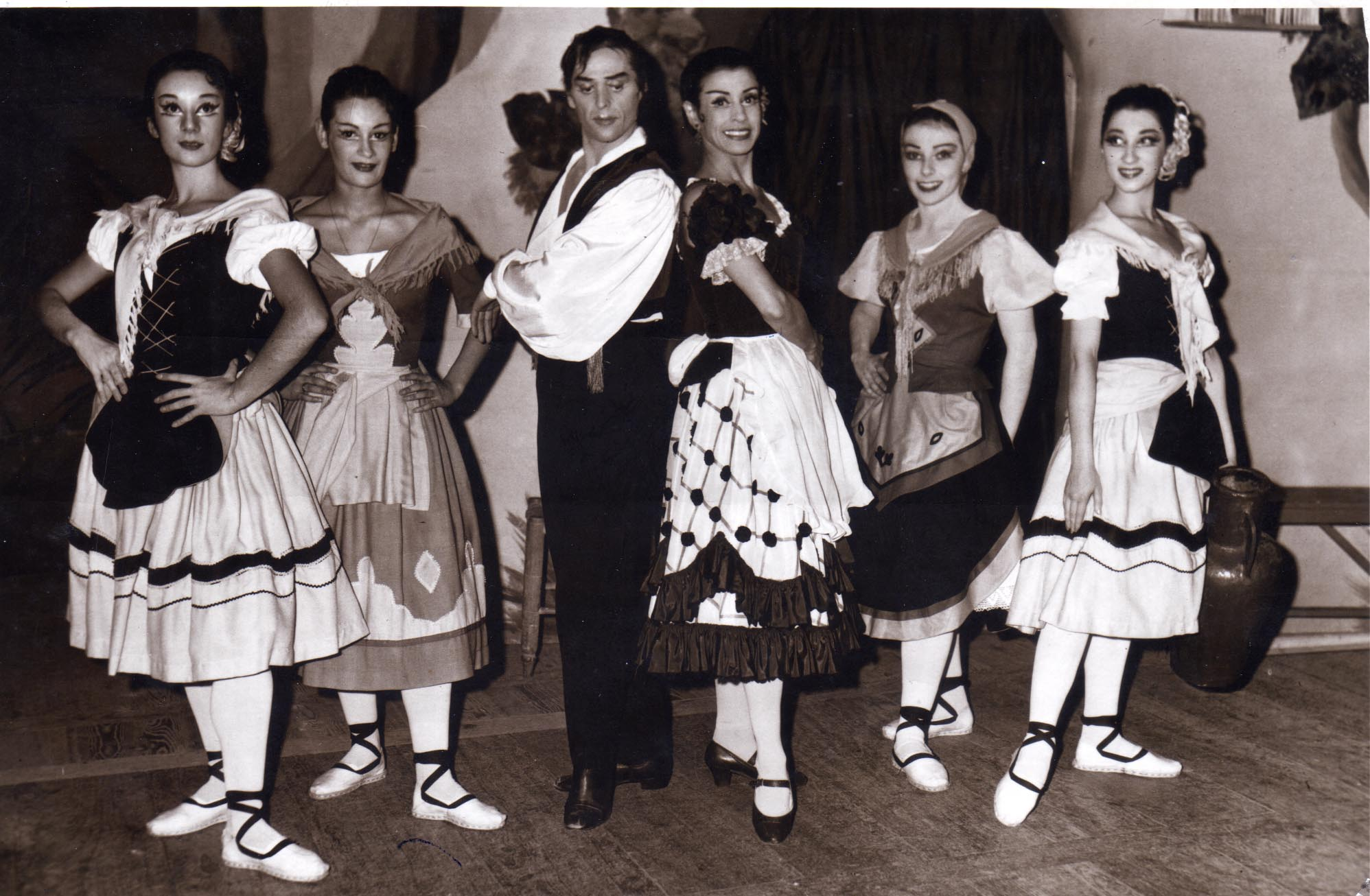 Esmeralda Agoglia y José Neglia con integrantes del Cuerpo de Baile del Teatro Argentino de La Plata en una escena del ballet "El sombrero de tres picos", junto a Norma Binaghi, Beatriz Baz, Mabel Astarloa y Leonor Baldassari. (julio de 1963) Foto del Archivo Histórico Artístico del Teatro Argentino de La Plata